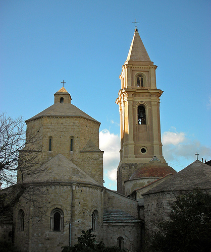 L'abside della cattedrale di Ventimiglia in provincia di Imperia.